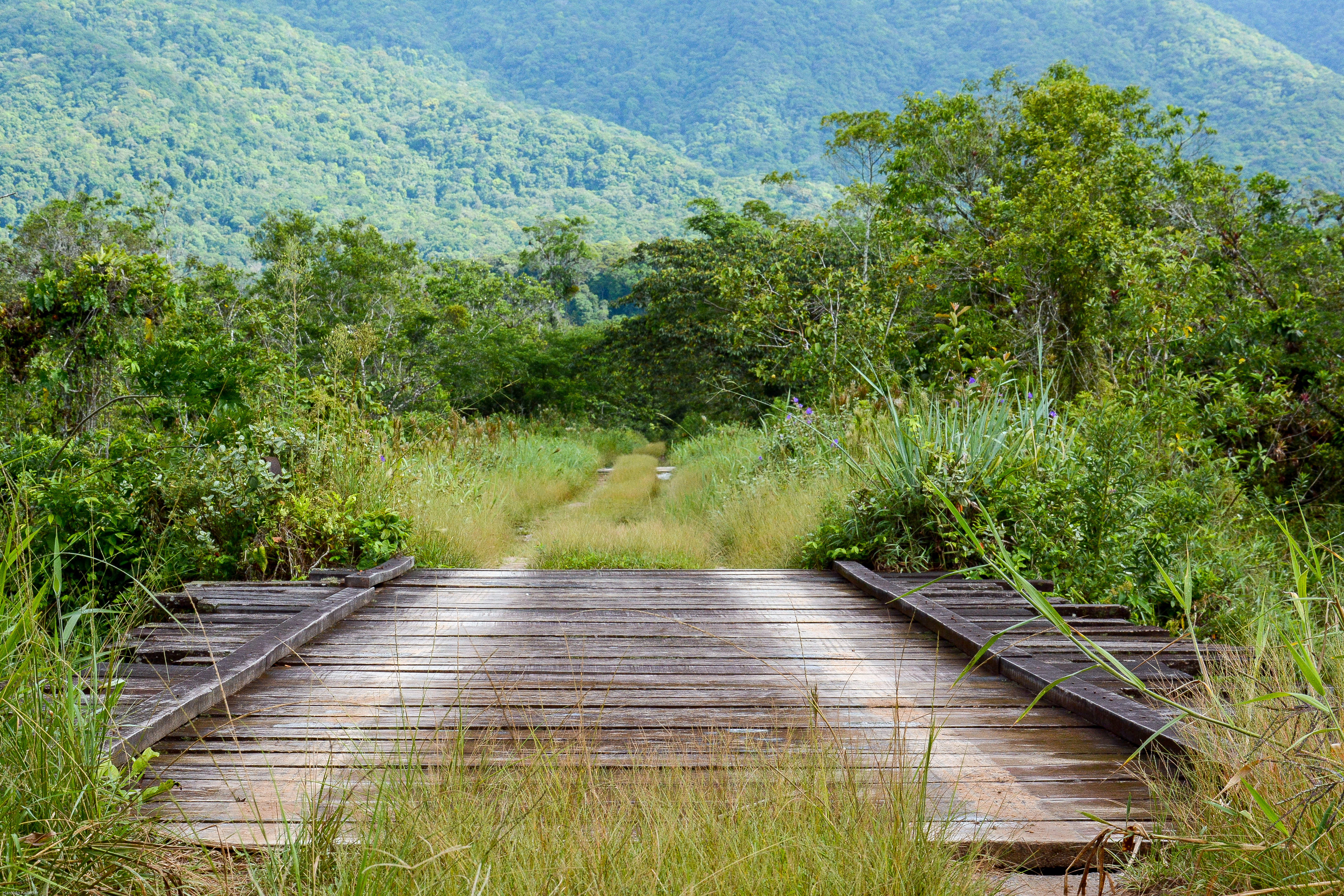 Contando com 9.312 Hectares, o Parque Estadual Restinga de Bertioga – PERB - foi criado em 09 de dezembro de 2010 pela Fundação Florestal. É uma Unidade de Conservação de Proteção Integral totalmente inserida no território do Município de Bertioga/SP, que tem por objetivo conservar o ecossistema associado à Mata Atlântica no Estado de São Paulo. Aberto à visitação pública monitorada, o Parque conta com diversos rios e trilhas, dentre estas, a Trilha D’Água e a Trilha do Guaratuba.